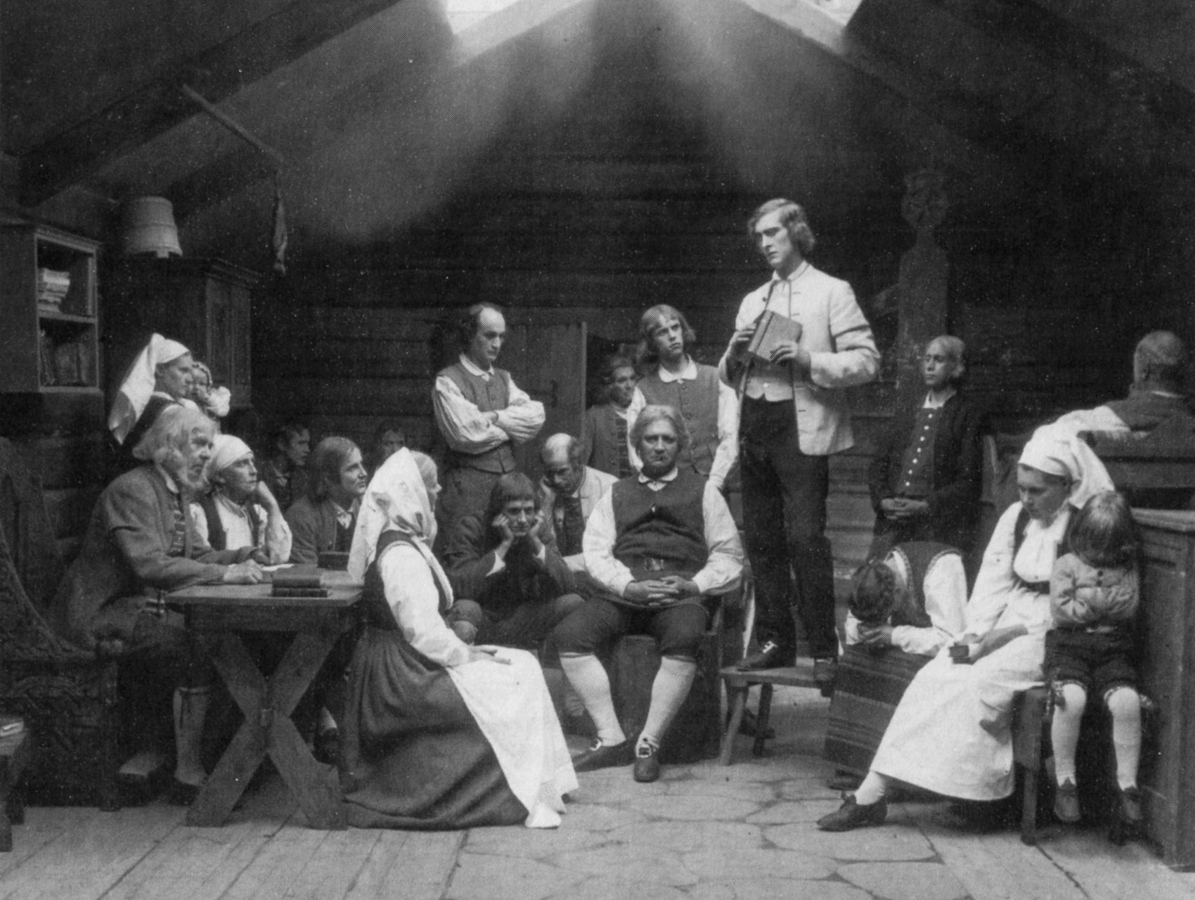 Scen ur stumfilmen Synnöve Solbakken